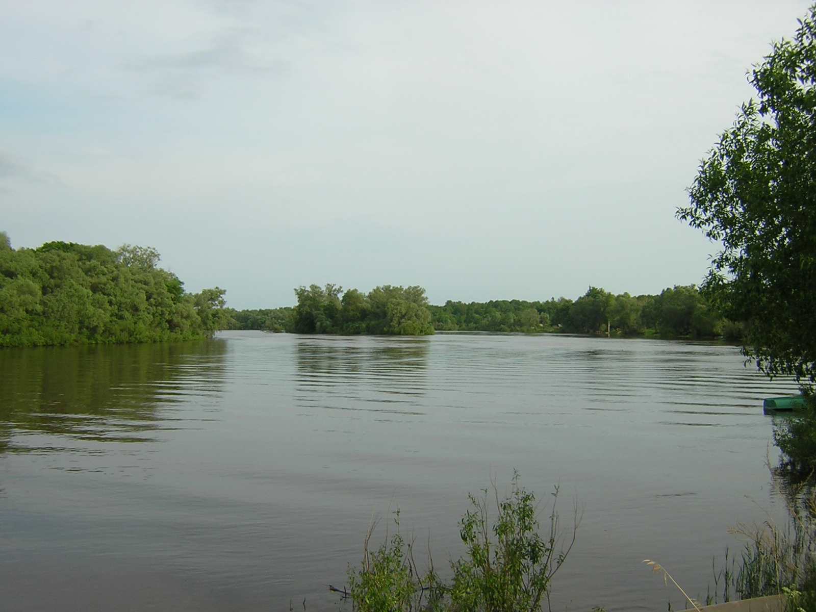 Река Пола в районе деревни Городок Парфинского района Новгородской области